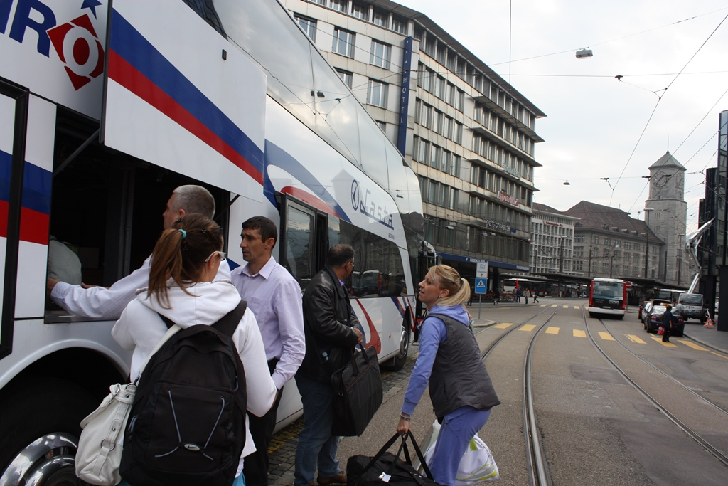 Boarding St. Gallen